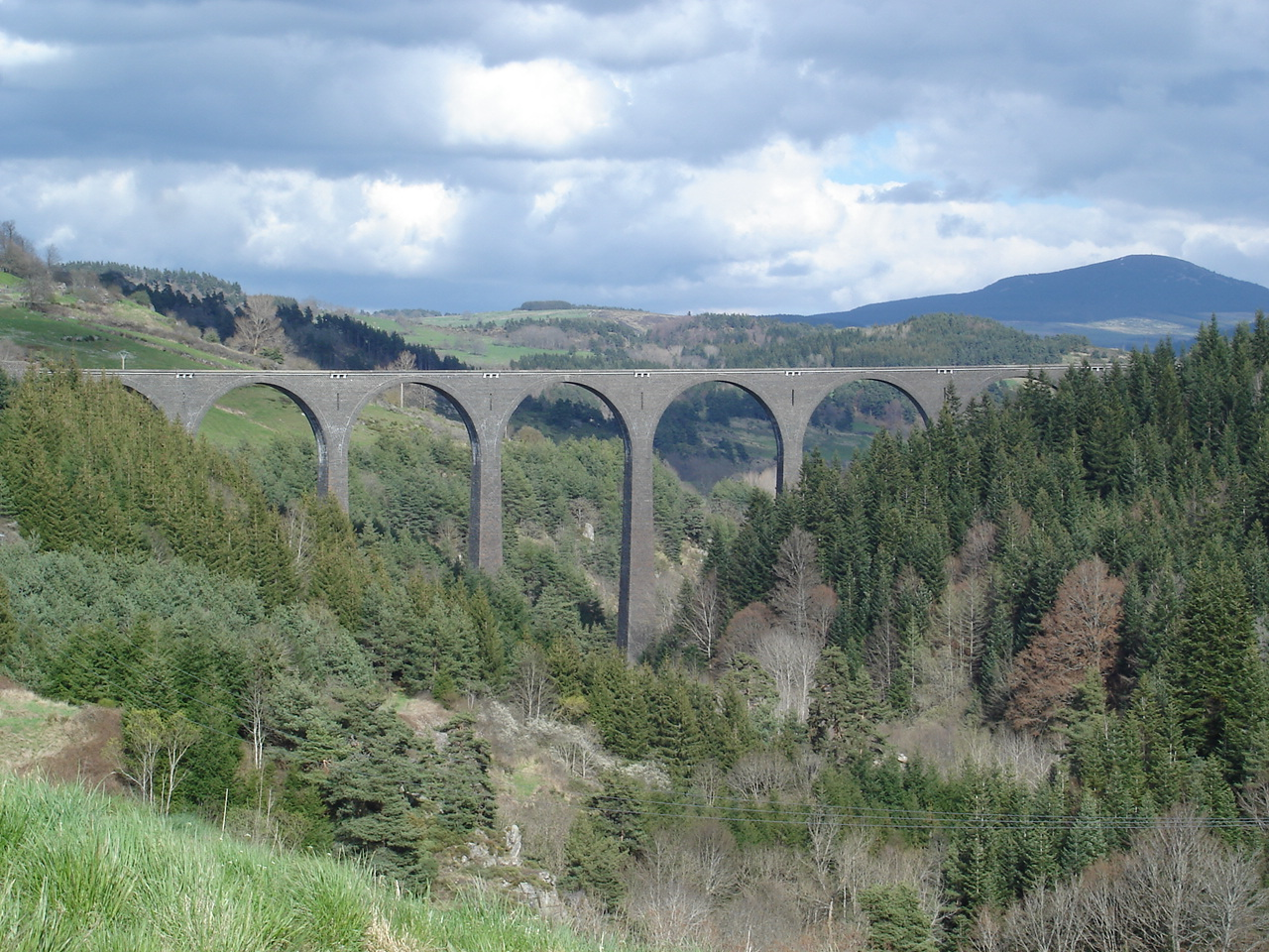 Viaduc de la Recoumène, près du village du Monastier-sur-Gazeille, dans le départ. de la Haute-Loire, France (région Auvergne).